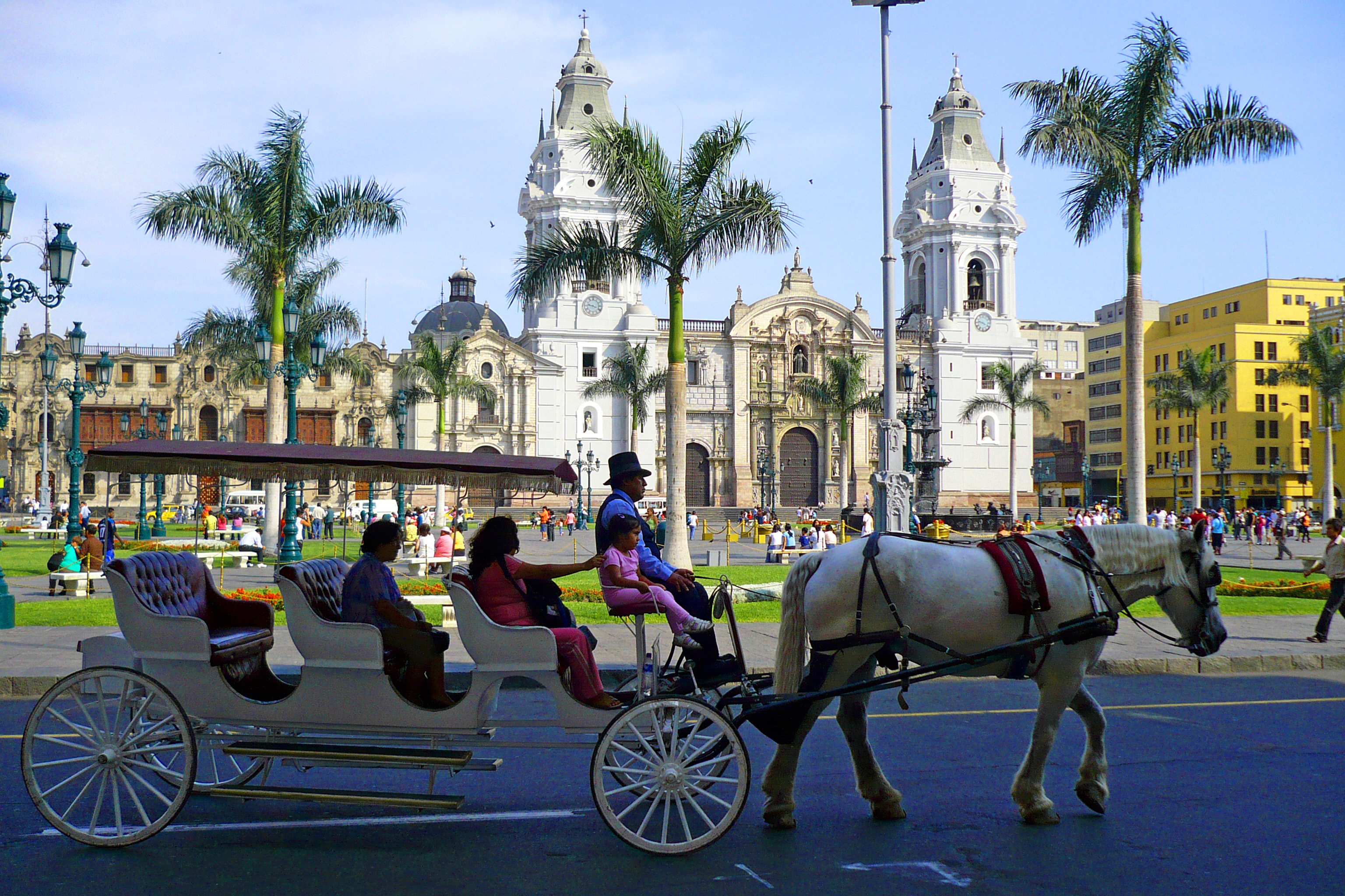 Plaza de Armas, Lima